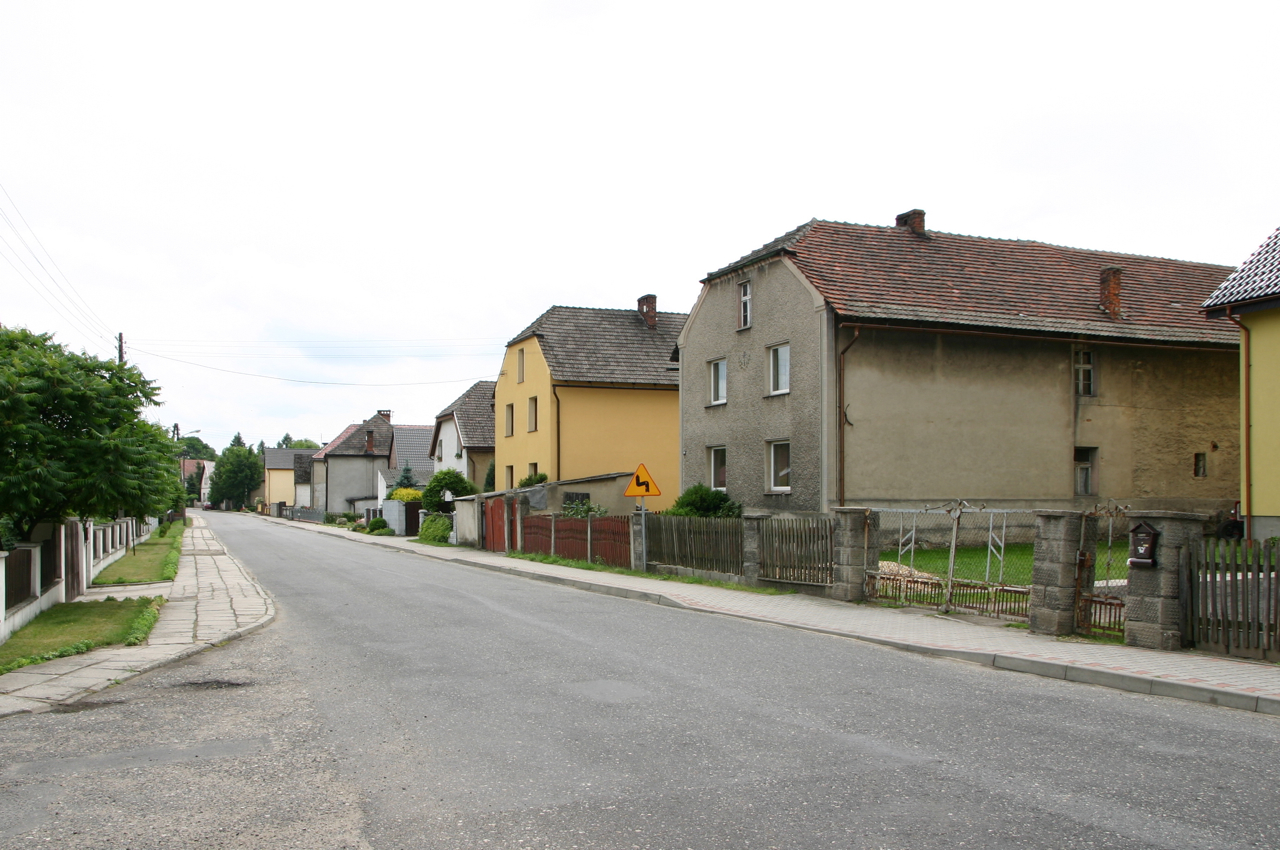 Żużela – wieś w Polsce położona w województwie opolskim, w powiecie krapkowickim, w gminie Krapkowice.